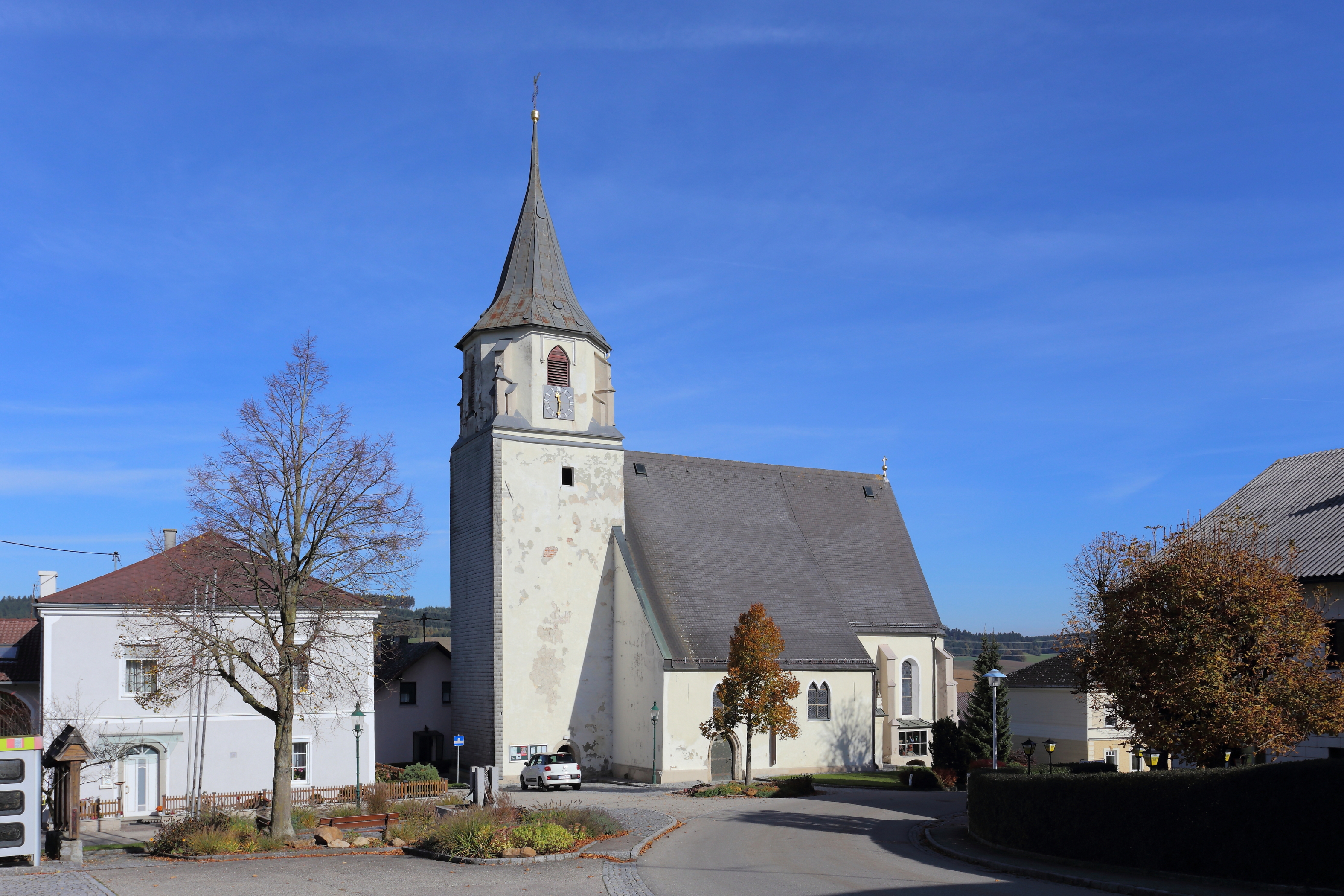 Südwestansicht der katholischen Pfarrkirche Mariä Namen in der oberösterreichischen Gemeinde Wippenham. Eine weiträumige spätgotische Kirche mit einem mächtigen Westturm.